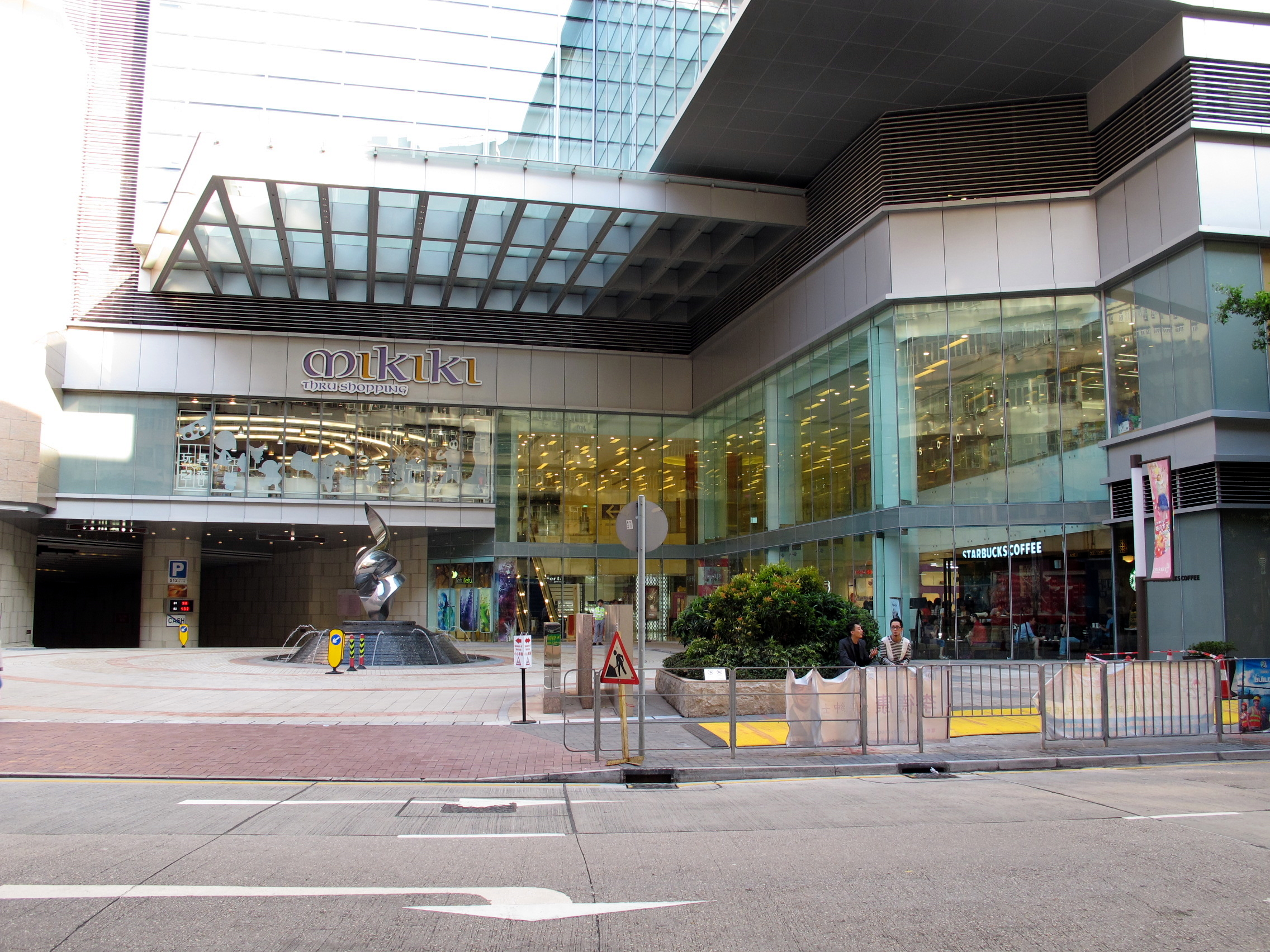 Mikiki Mall Main Enterance